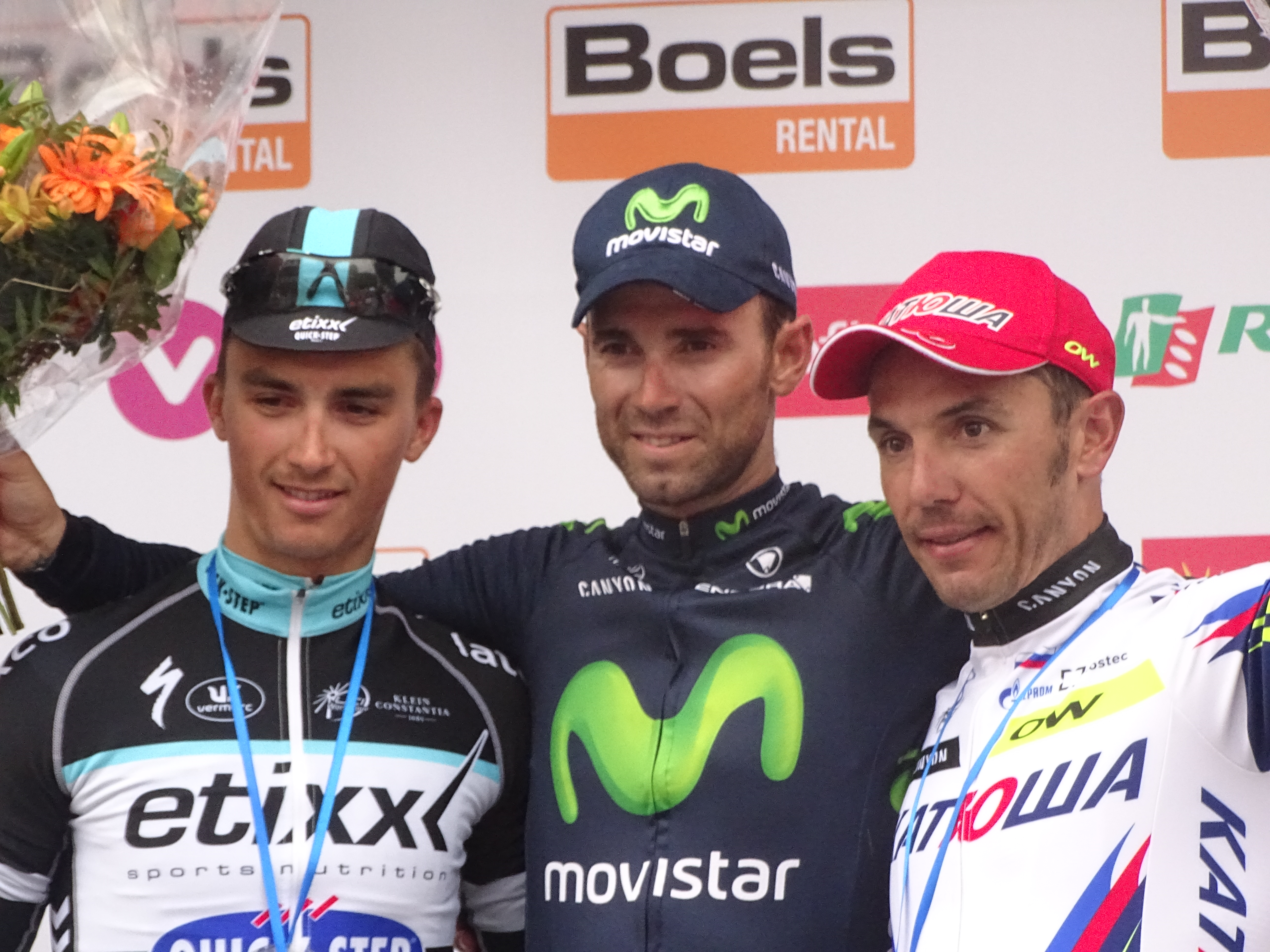 Reportage réalisé le dimanche 26 avril à l'occasion de l'arrivée de Liège-Bastogne-Liège 2015 à Ans, Belgique.